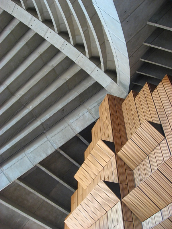 Detalle del interior de la ópera de Sydney